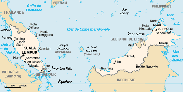 francisation d'après le CIA WFB par --flayais 25 déc 2004 à 17:33 (CET) Historique de la carte originale :non elle pue pas (suppr) (actu) 18 septembre 2005 à 13:18 . . Sting . . 626x316 (51580 octets) (Trémas; accents circonflexes; correction Équateur) (suppr) (rétab) 25 décembre 2004 à 13:31 . . Flayas. . 626x316 (26975 octets) (g)